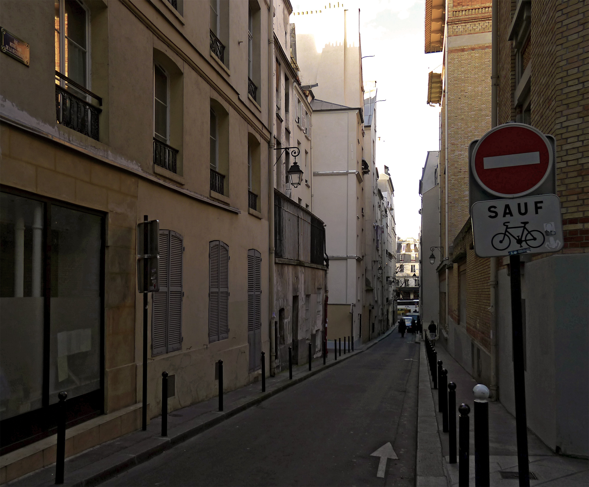 Rue Notre-Dame-de-la-Recouvrance - Paris II